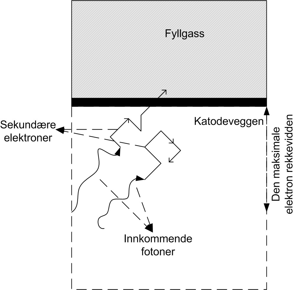 Deteksjon av gammastråler i Geiger-Müller-rør